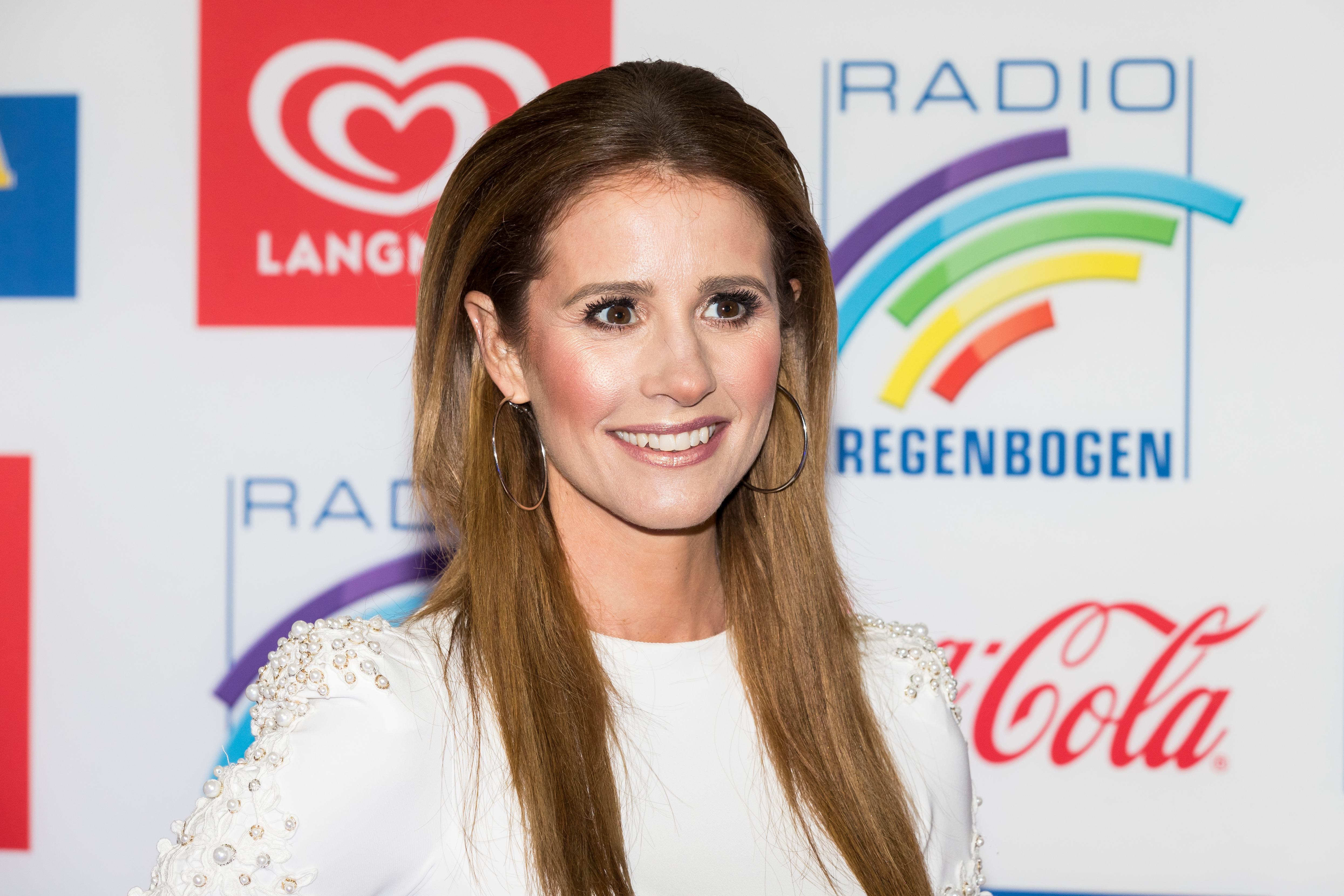 during Radio Regenbogen Award 2018 at Europapark, Rust, Baden-Württemberg, Germany on 2018-03-23, Photo: Sven Mandel